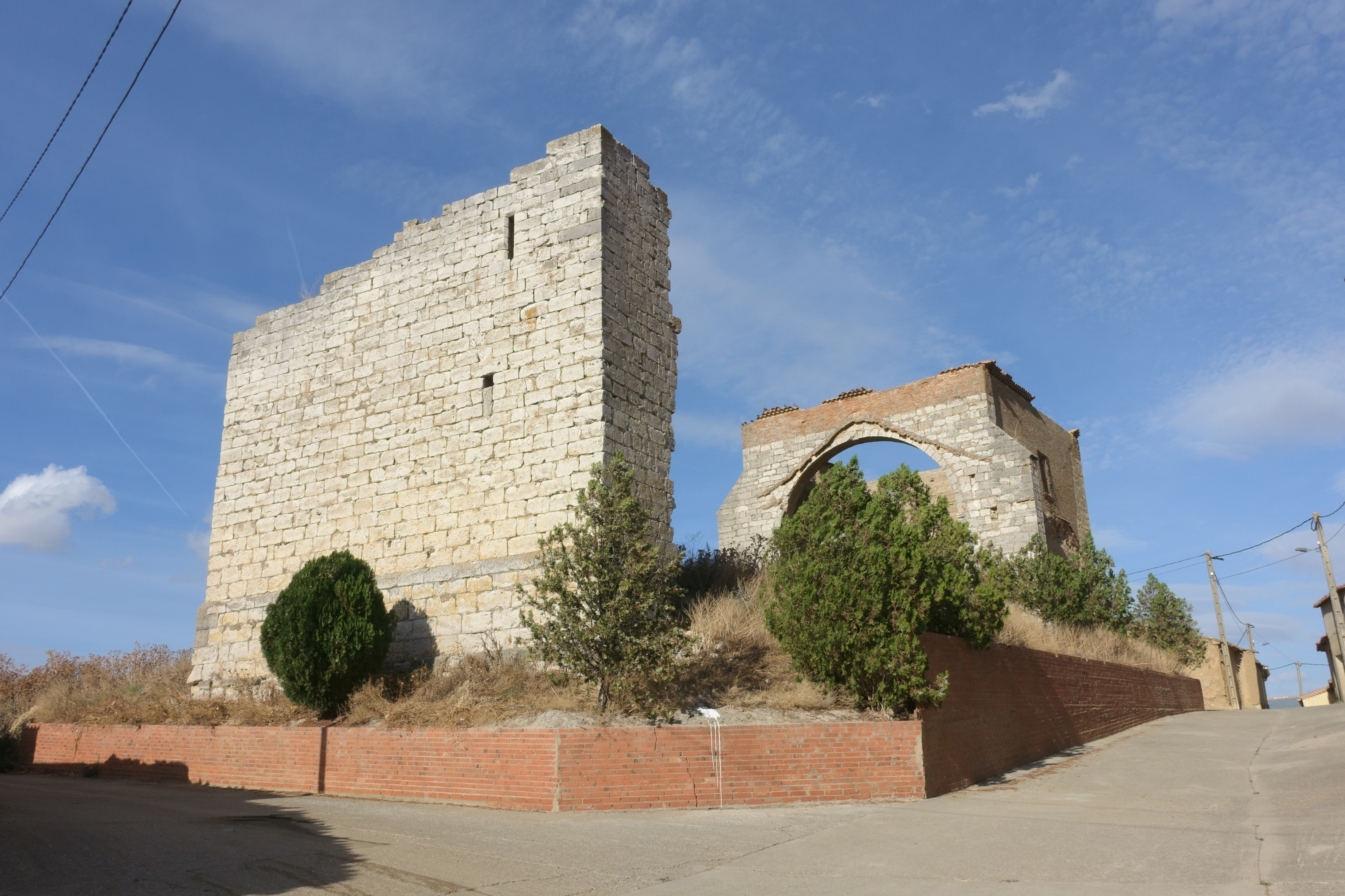 Ruinas de la iglesia de San Juan, Malva (Zamora, España).